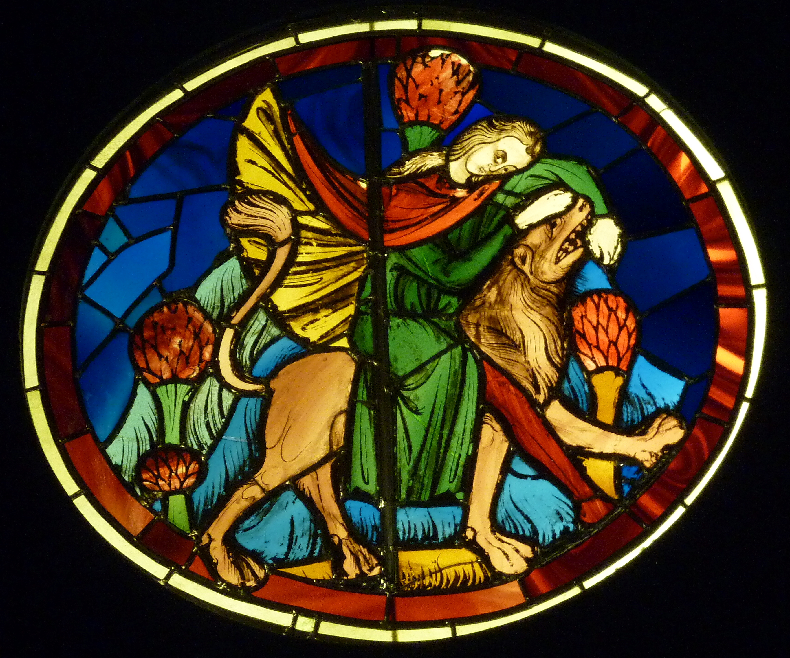 Bleiglasfenster im Musée National du Moyen Âge (Hôtel de Cluny) in Paris; Herkunft: Sainte-Chapelle in Paris, vor 1248; Darstellung: Samsons Kampf mit dem Löwen